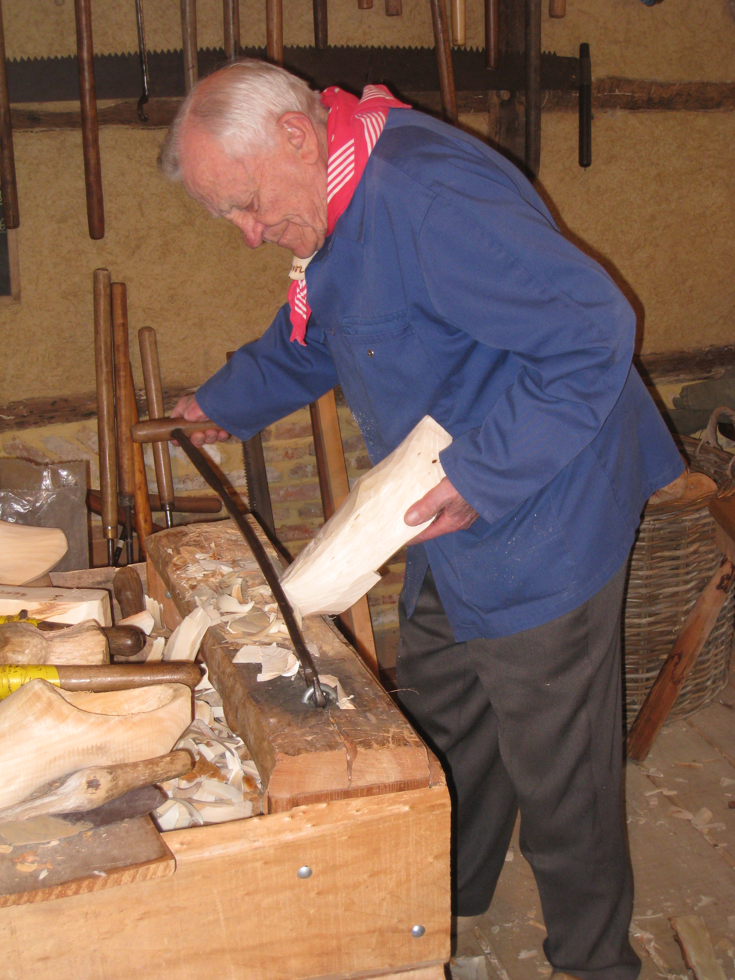 Klompenmaker Mondelaers aan het werk in het Klompenmuseum Den Eik te Laakdal, Kempen